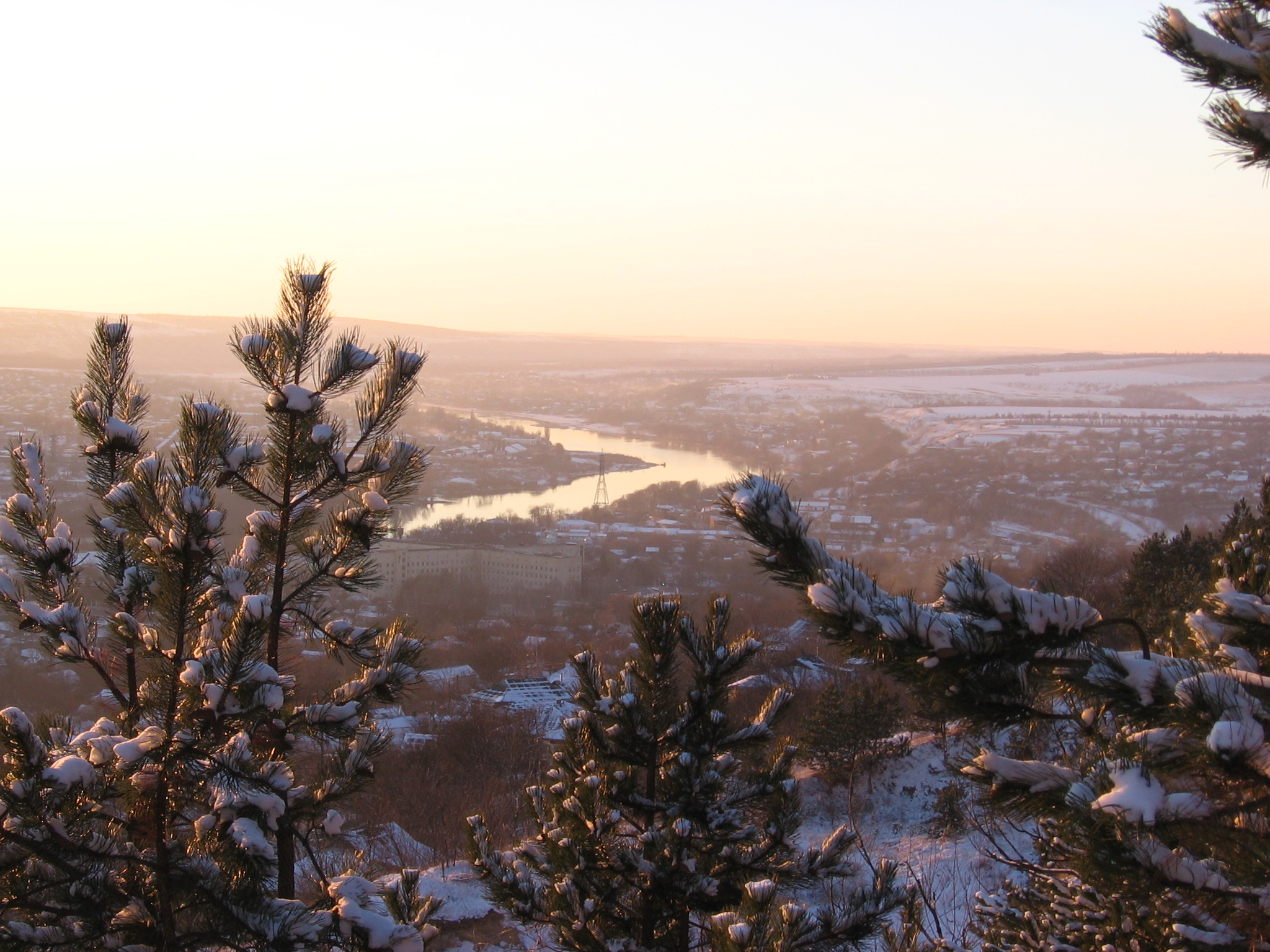 Могилев-ПодольскийВид на Днестр